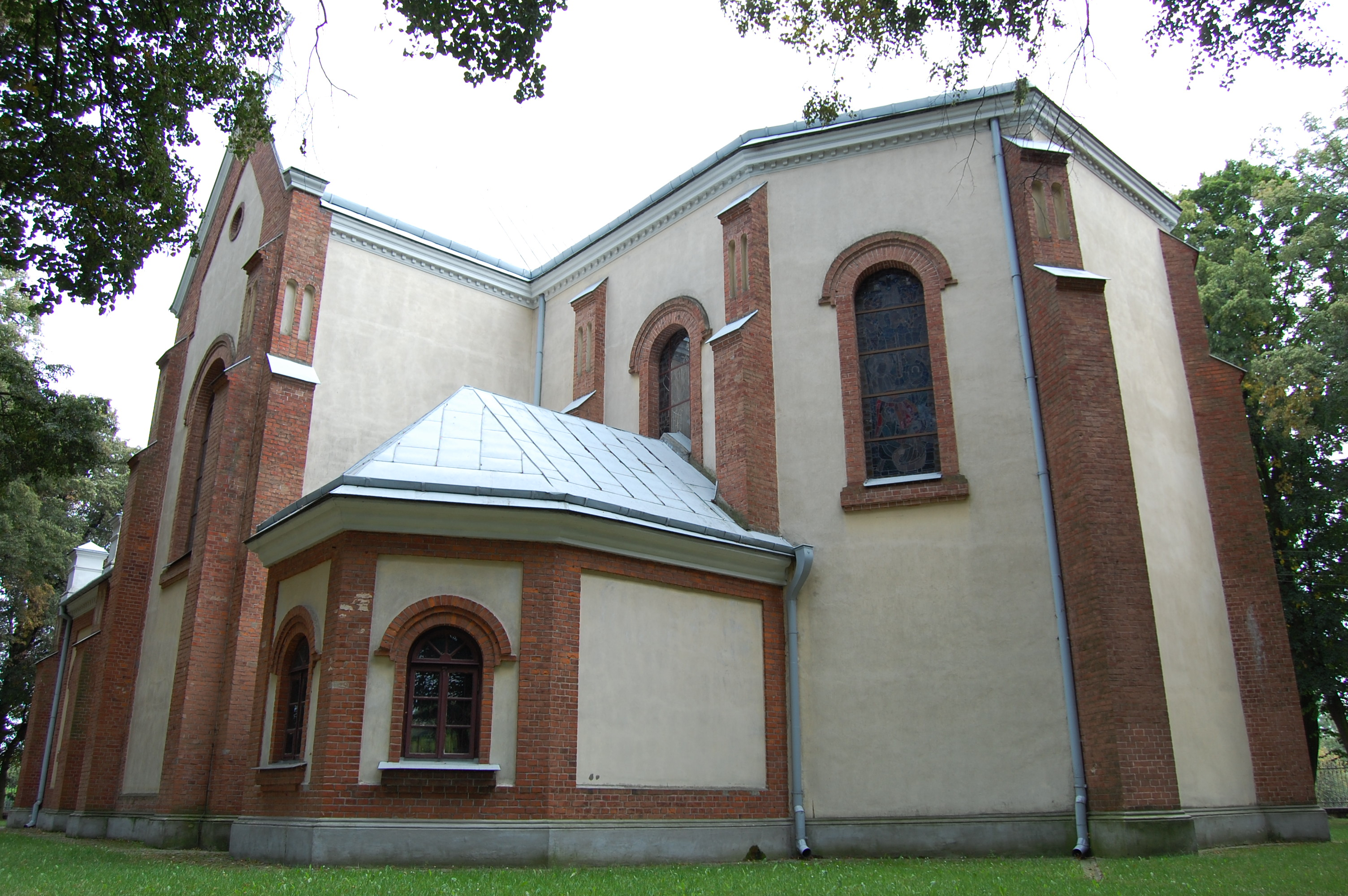 Kościół pw. Wniebowzięcia NMP w Konopnicy